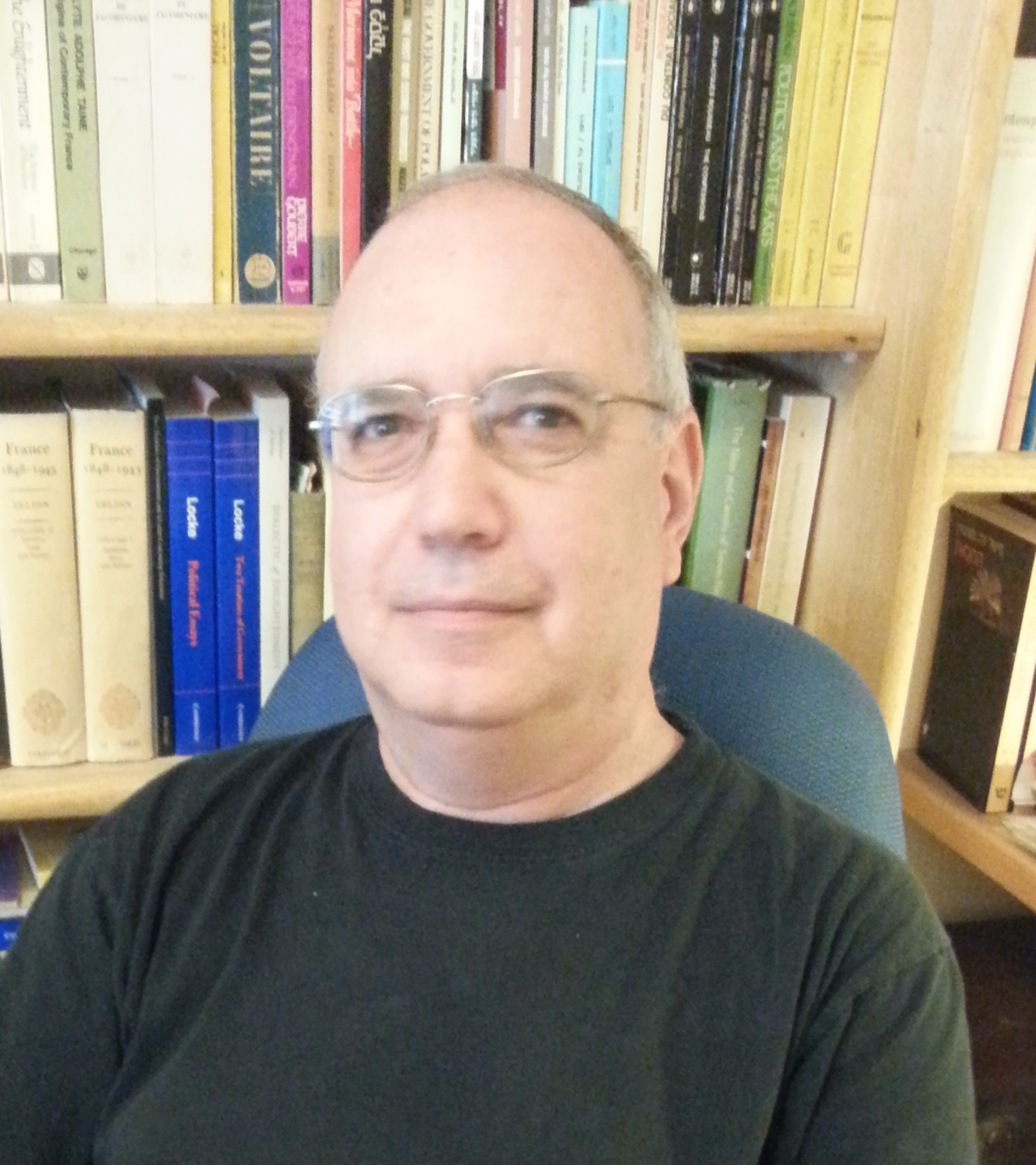 עמוס הופמן